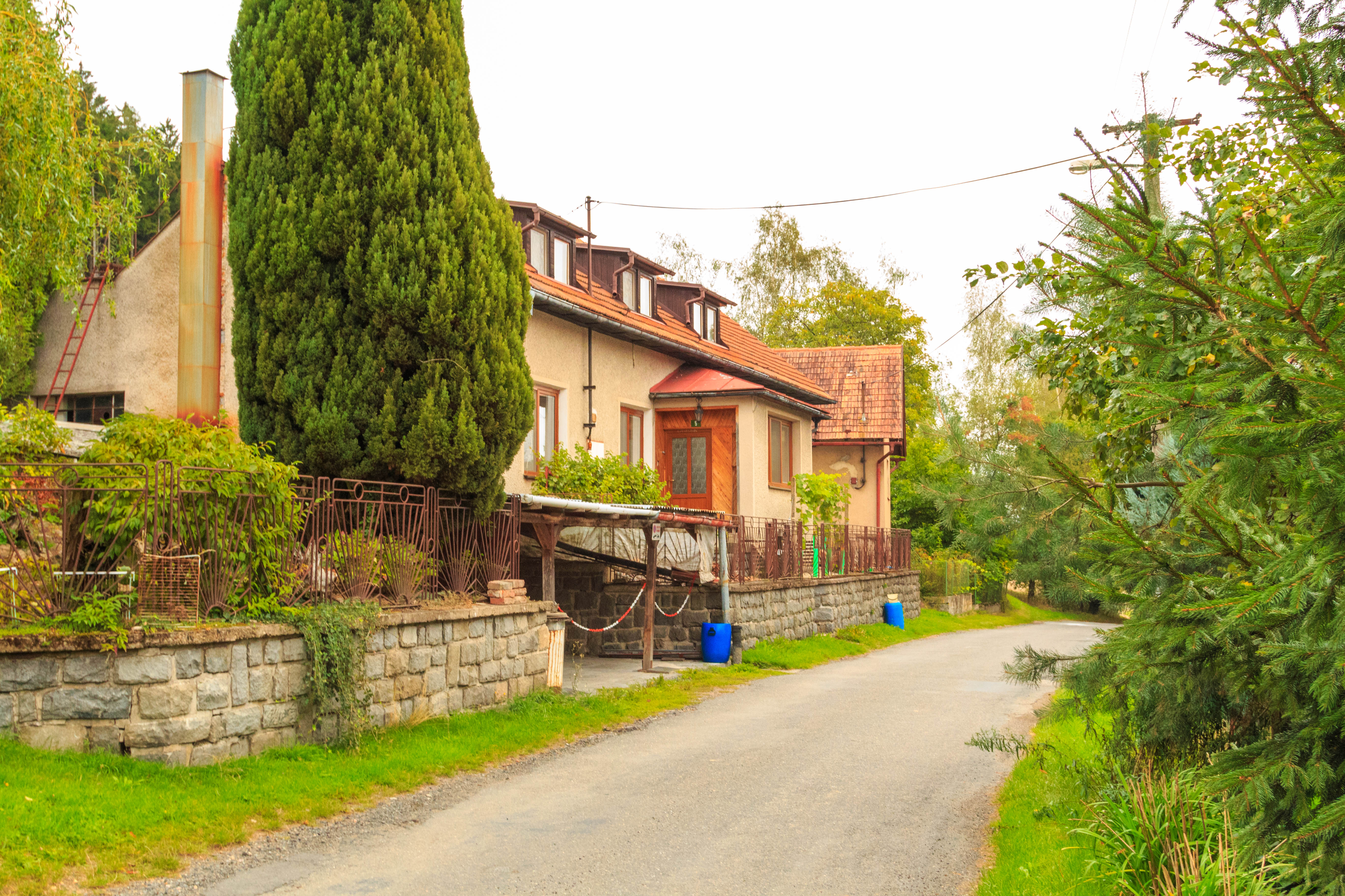 Podhořice čp. 5